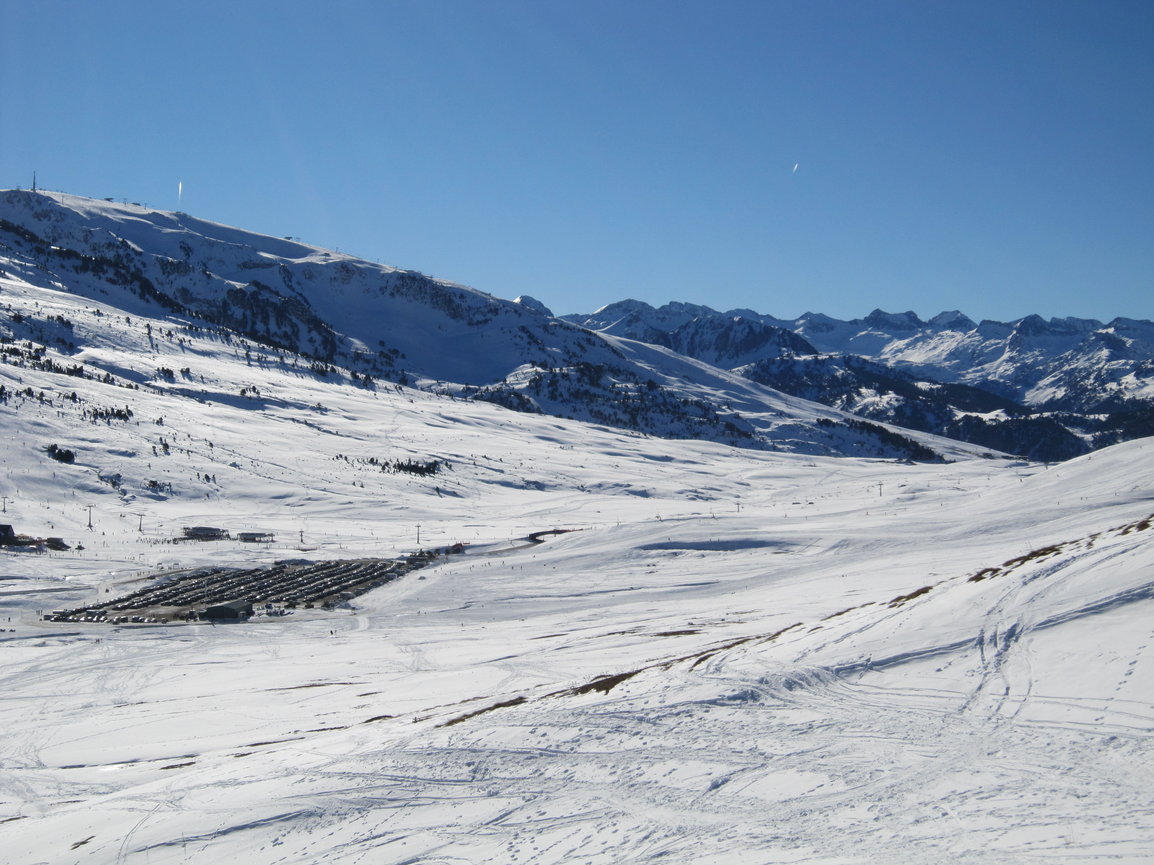 Pla de Beret des de la Cabana de Gessa.